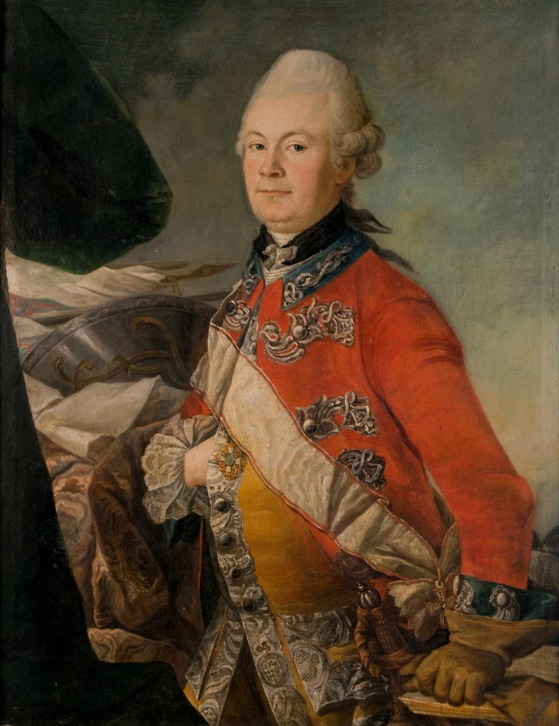 Porträtt av okänd officer iklädd uniform för det Danska Kungliga Livgardet till Häst. Mannen bär Dannebrogordens band över axeln. Porträtt från ca 1750 av Johan Hörner.